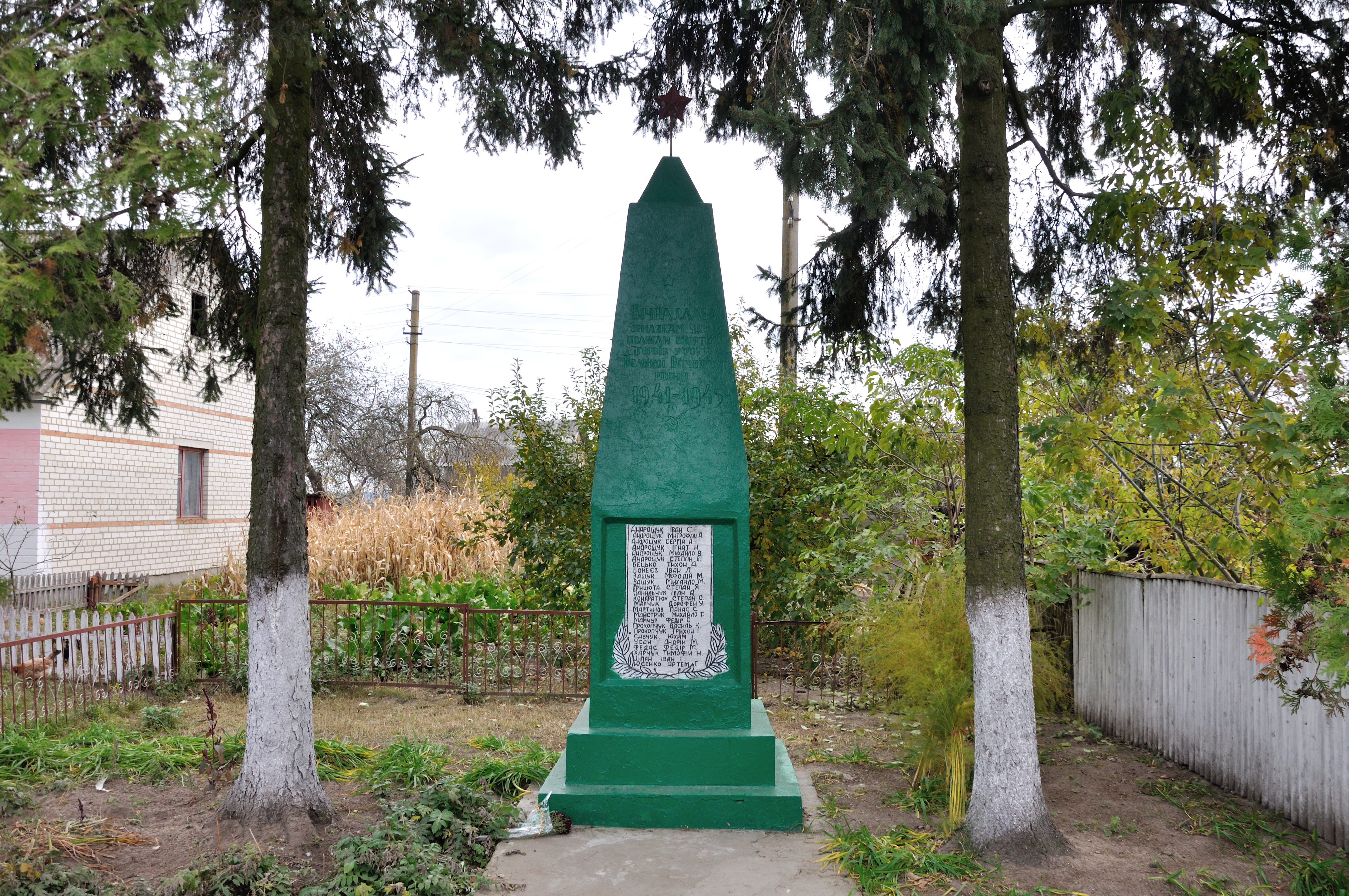 Пам’ятник радянським воїнам-односельчанам, с. Білка